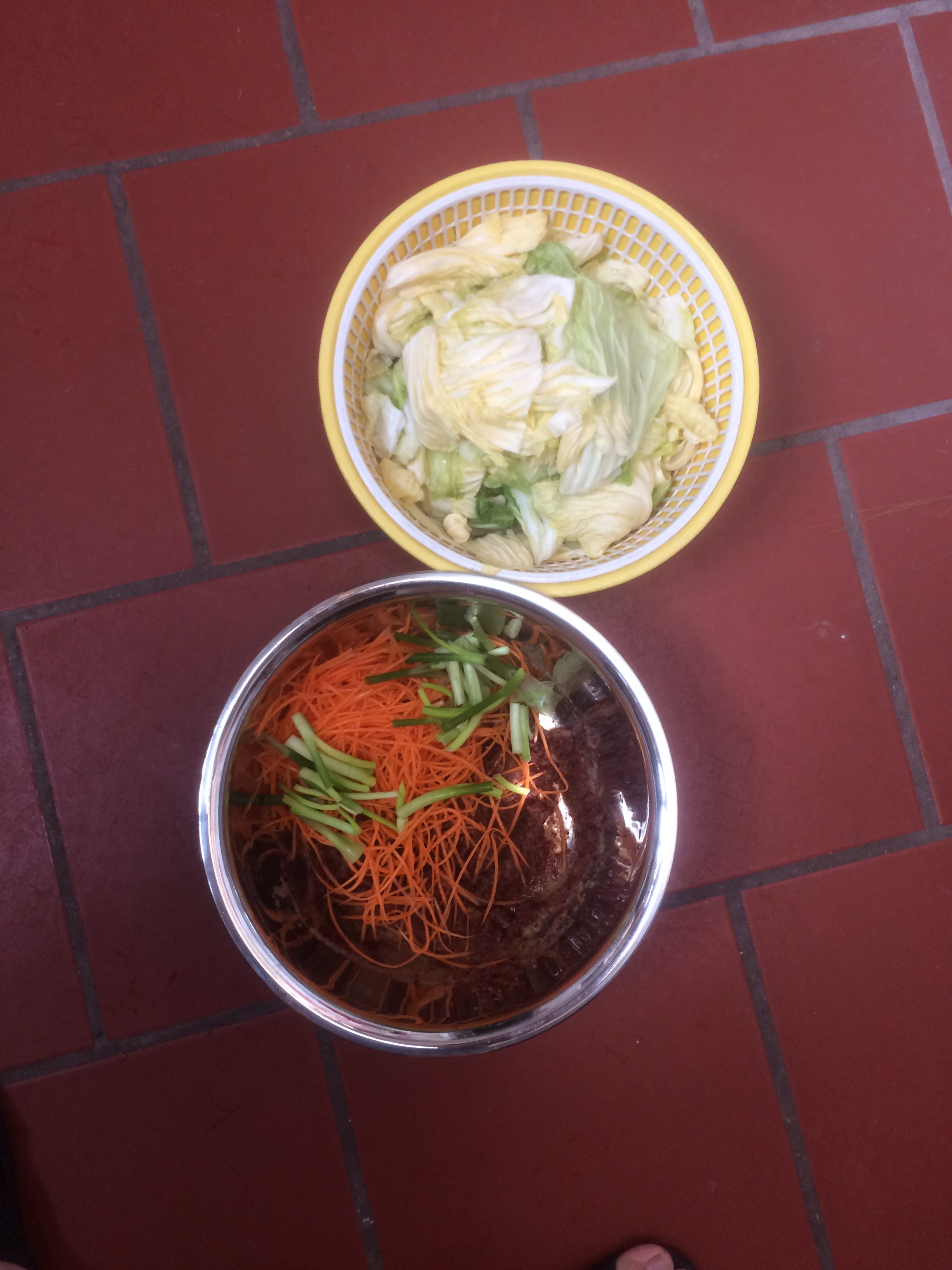 양배추김치의 재료